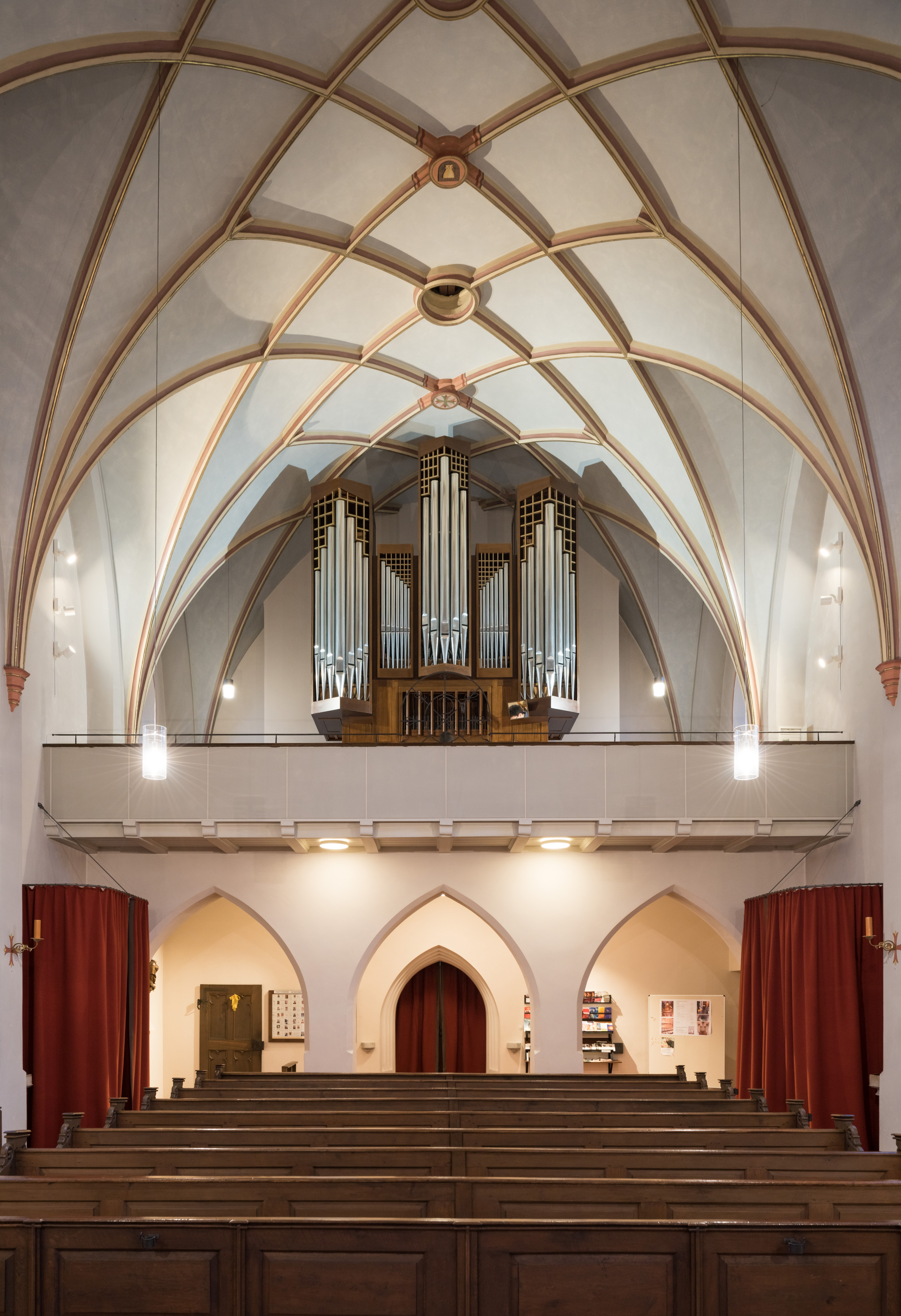 Chorempore der Kirche, Church of the Assumption (Haag in Oberbayern)